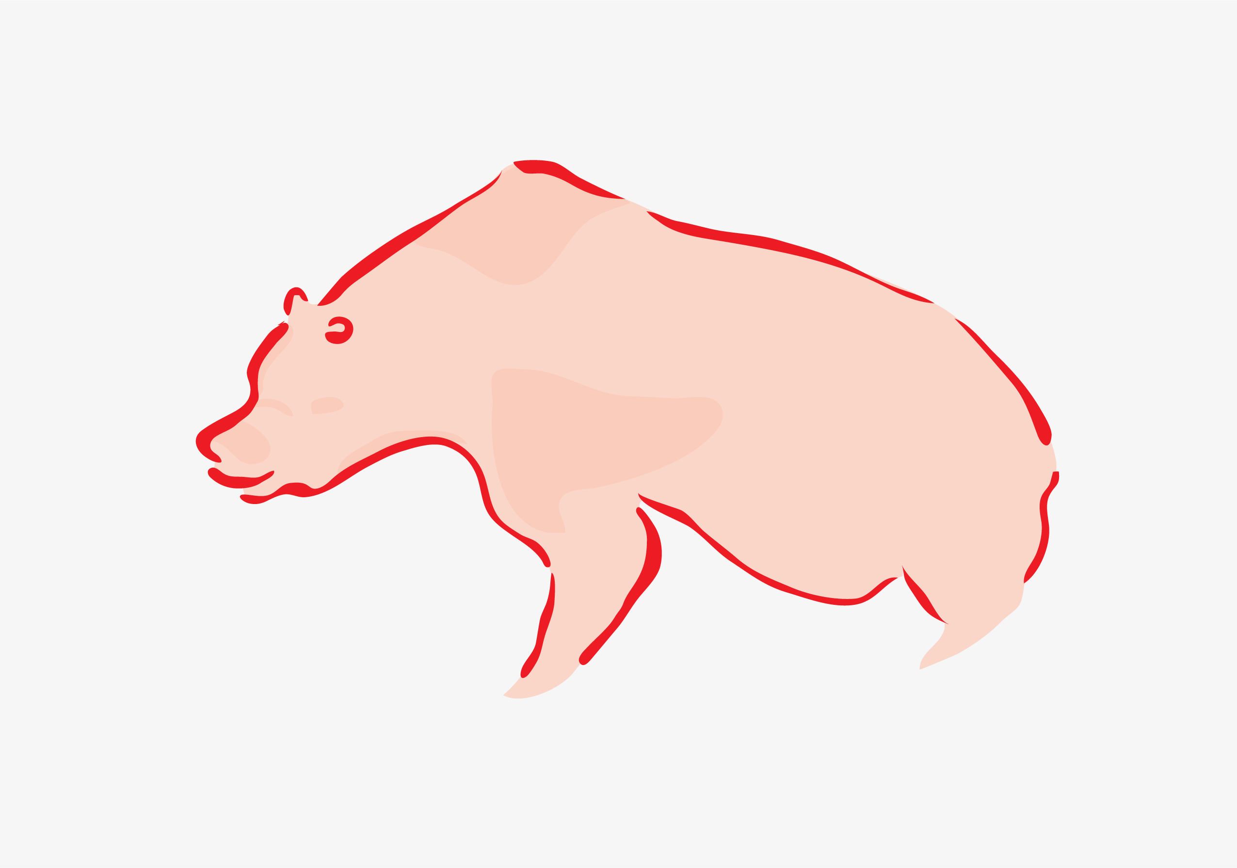 Représentation d'un ours peint sur les parois de la grotte Chauvet (Ardèche, France).